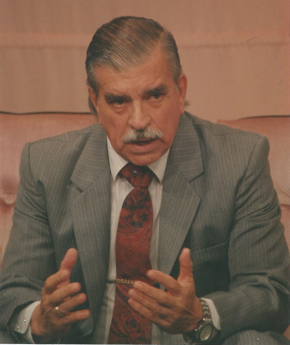 Miguel Ángel Alterach, alías Toto, (Posadas, 6 de agosto de 1922) es un político y escribano argentino, que ocupó el cargo de Gobernador de Misiones entre el 25 de mayo de 1975 y el 24 de marzo de 1976, cuando es desplazado del cargo por el Proceso de Reorganización Nacional; con el regreso de la democracia en Argentina, 1983, fue elegido como diputado nacional, como previamente a gobernador como diputado provincial, en tres oportunidades (1985, 1989, 1996) y Vicegobernador de Misiones, en 1991 hasta 1995, del gob. Federico Ramón Puerta.